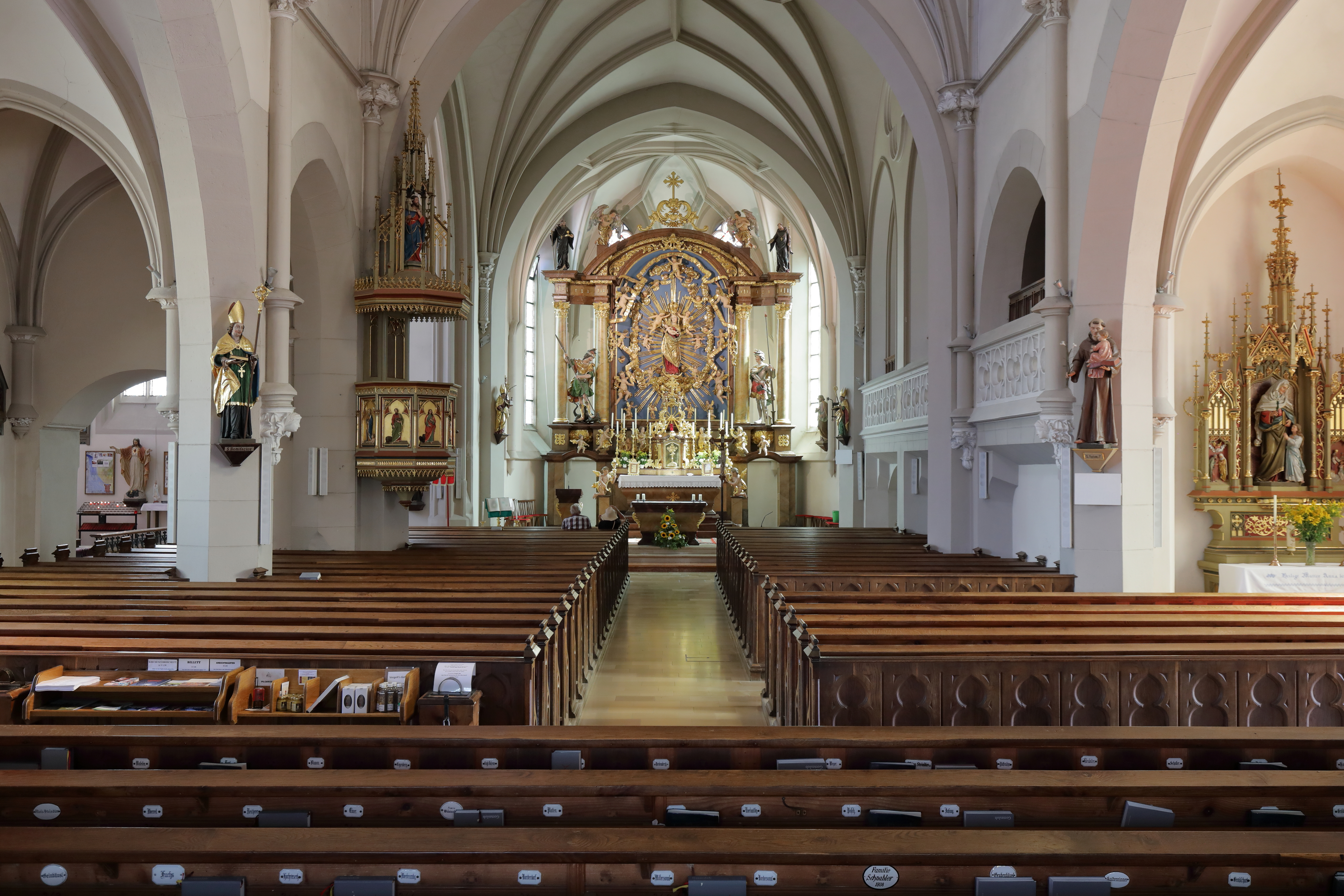 Innenansicht der röm.-kath. Pfarr- und Wallfahrtskirche hll. Maria und Oswald in der oberösterreichischen Gemeinde Maria Neustift.Ursprünglich eine geostete, spätgotische Kirche aus dem Ende des 15. Jahrhunderts. Nach schweren Sturmschäden entschloss man sich 1886 zum Neubau der Kirche. Ab 1891 wurde nach Plänen des Architekten Raimund Jeblinger in Nordsüdrichtung eine neues Langhaus mit Chorraum in neogotischem Stil errichtet und am 29. 9. 1898 von Diözesanbischof Franz Maria Doppelbauer feierlich geweiht. Der Chorraum von der Vorgängerkirche blieb erhalten und wurde als östliche Seitenkapelle integriert.